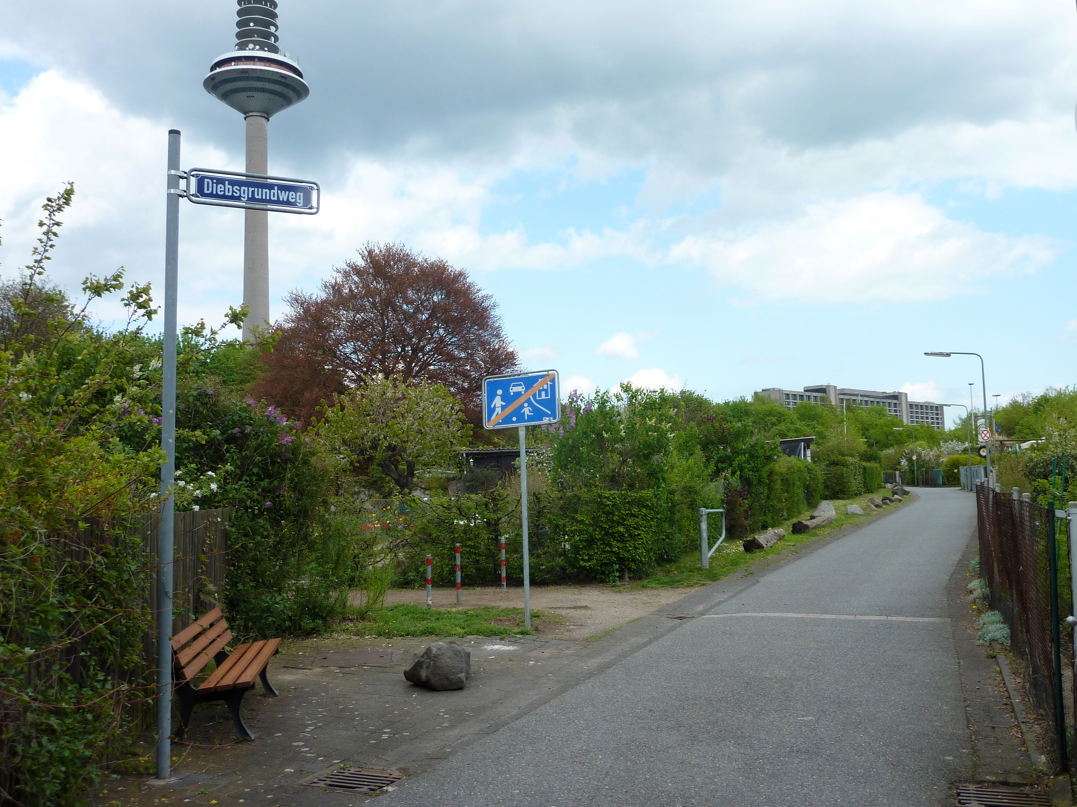 Der Diebsgrundweg in Frankfurt am Main (Stadtteil Bockenheim) ist ein Abschnitt der Altstraße Via Regia von Mainz nach Leipzig. Blickrichtung nach Nordosten, im Bildhintergrund links der Europaturm, rechts das Gebäude der Deutschen Bundesbank.